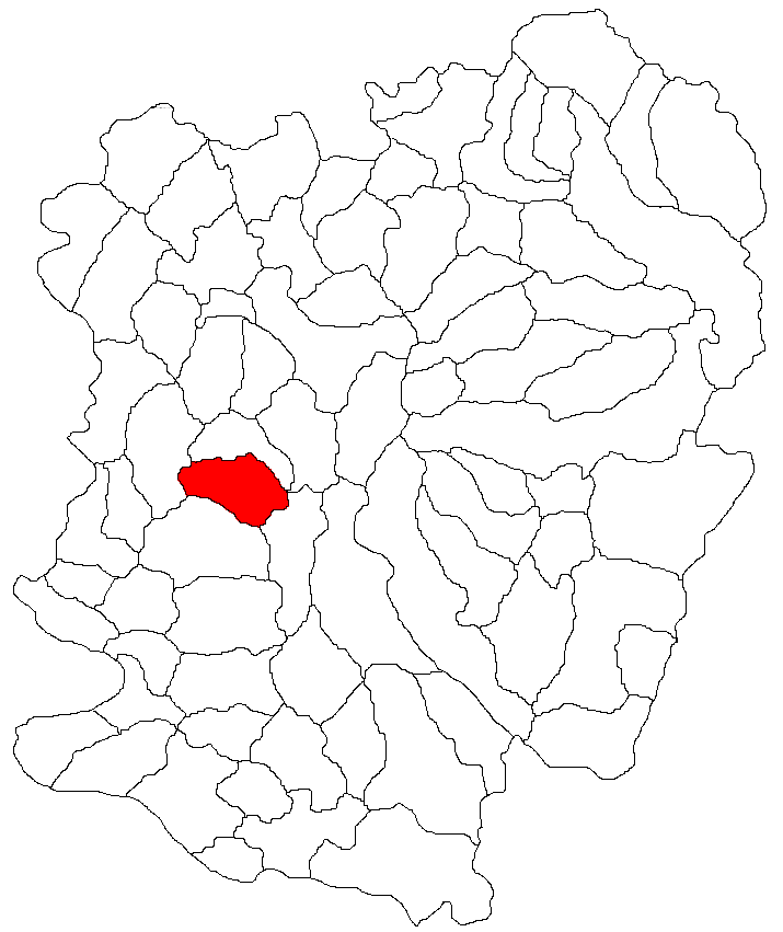 Categorie:Hărţi ale judeţului Caraş-Severin